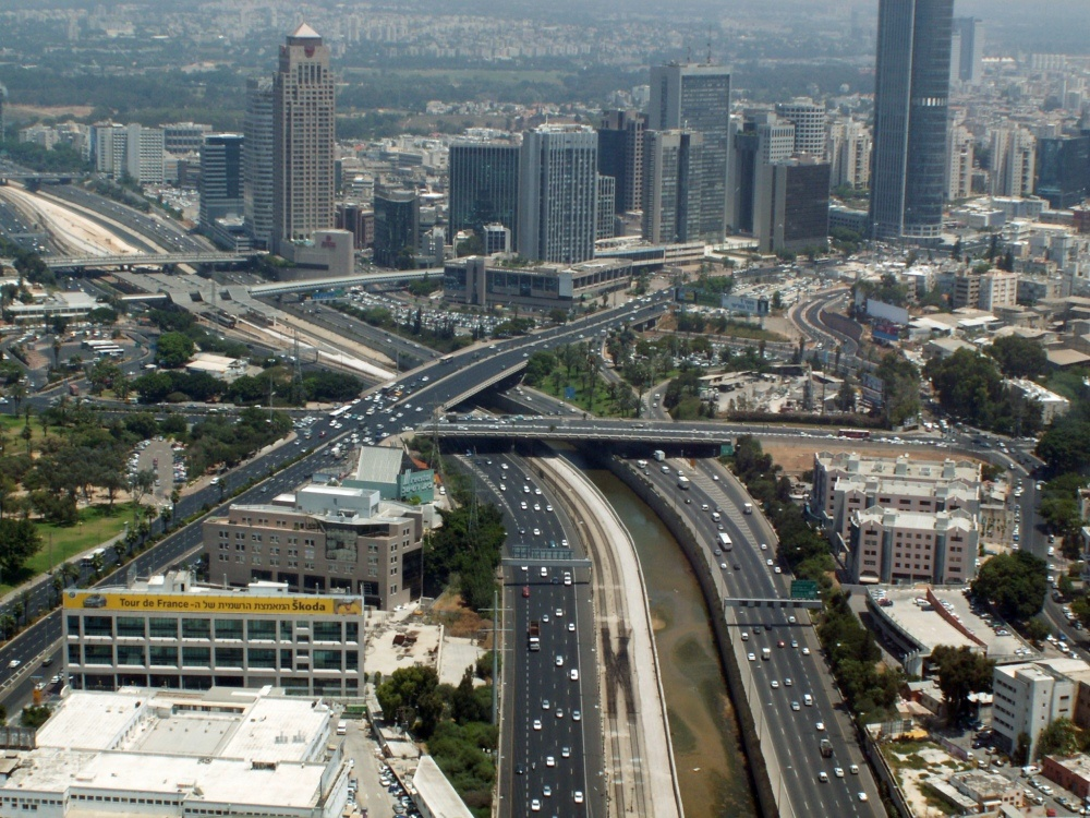 מחלף ארלוזורוב כפי שנראה ממצפה עזריאלי